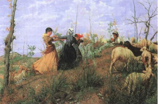 Girotondo